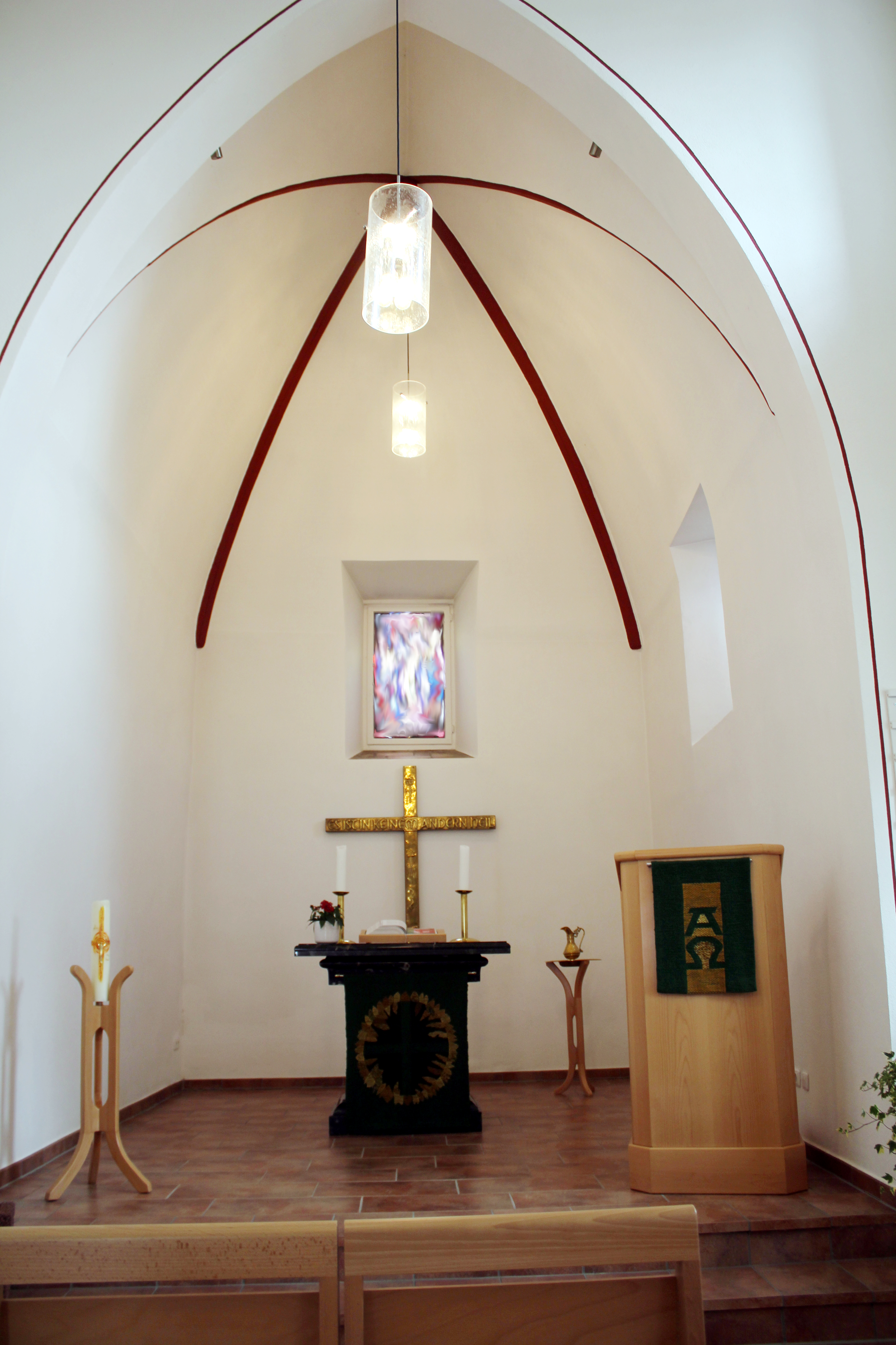 Evangelische Kirche Neukirchen, Braunfels, Lahn-Dill-Kreis, Hessen, Deutschland